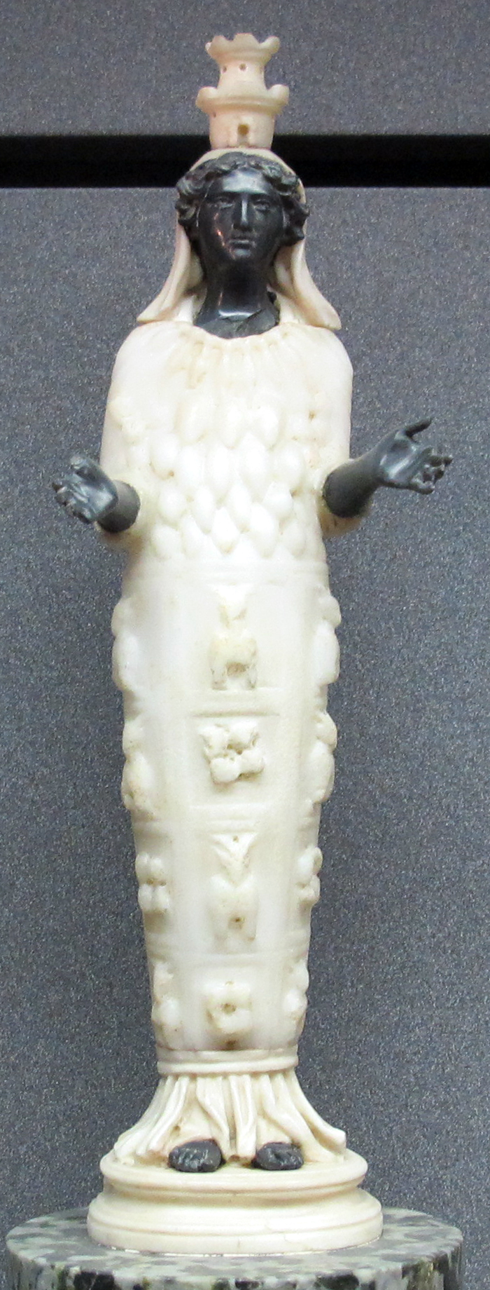 Museo civico archeologico (Bologna)